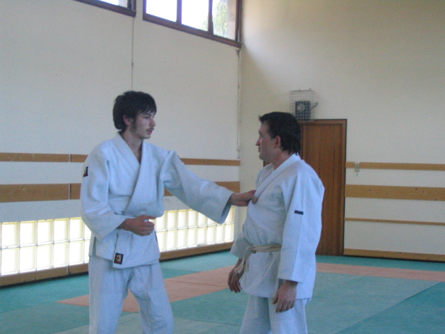 Munadori (胸取り) : collar hold